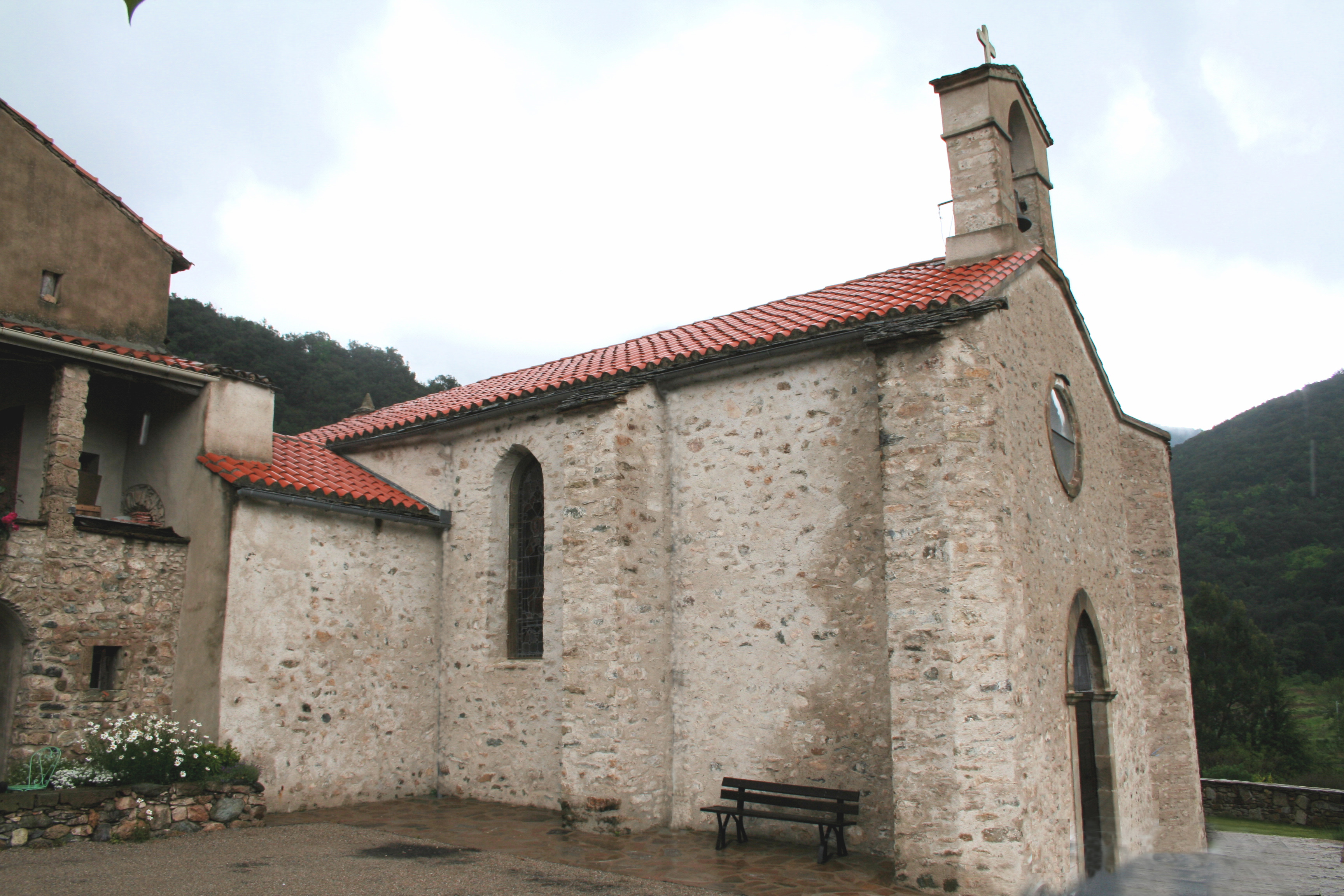 Saint-Geniès-de-Varensal (Hérault) - église paroissiale Saint-Geniès.